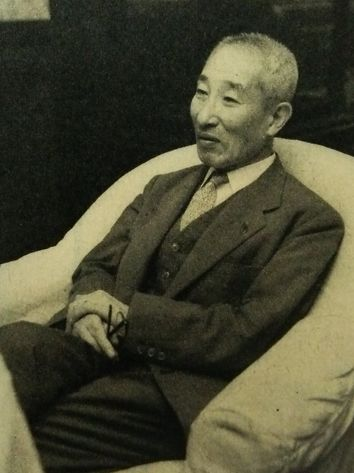 浅野長武（東京国立博物館館長）